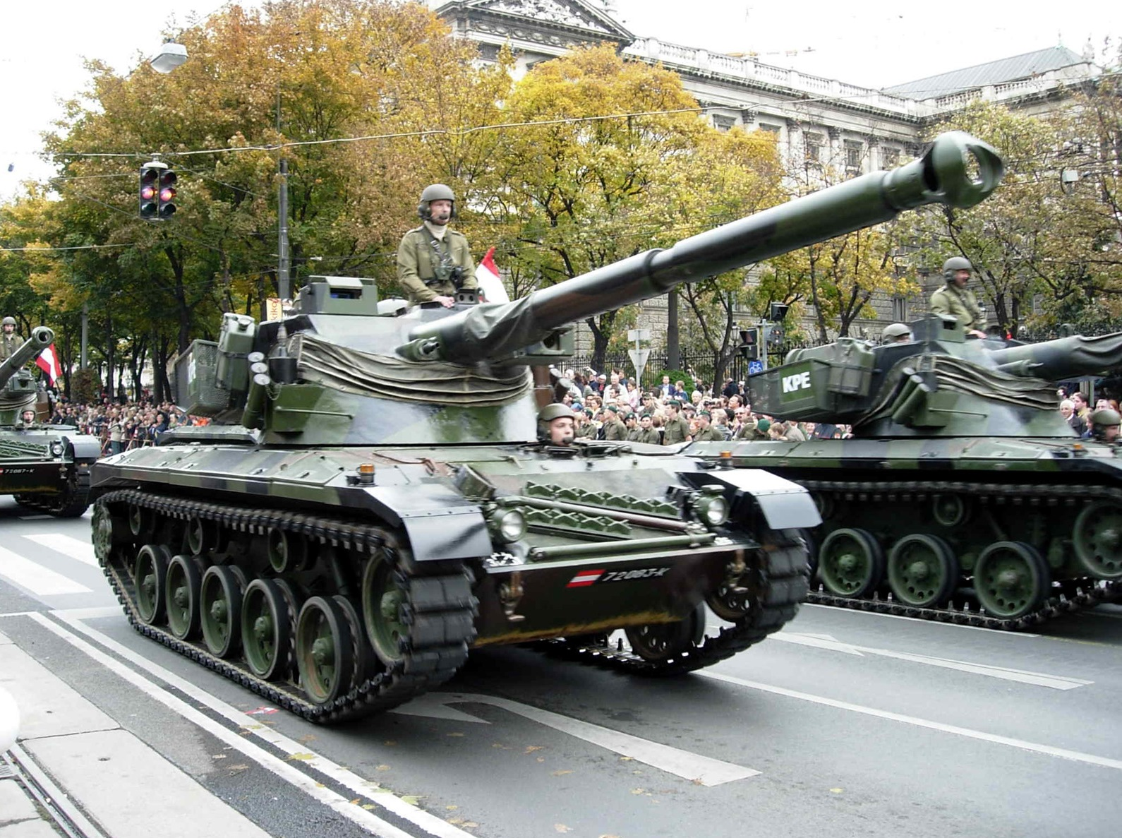 2005 Militärparade Wien Okt.26. 091